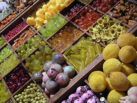 Glasperlen